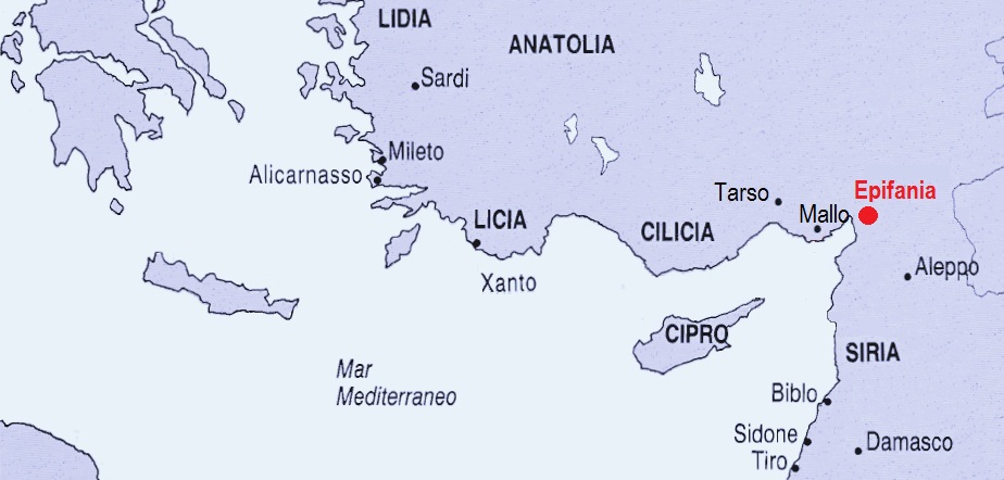 Epifania di Cilicia